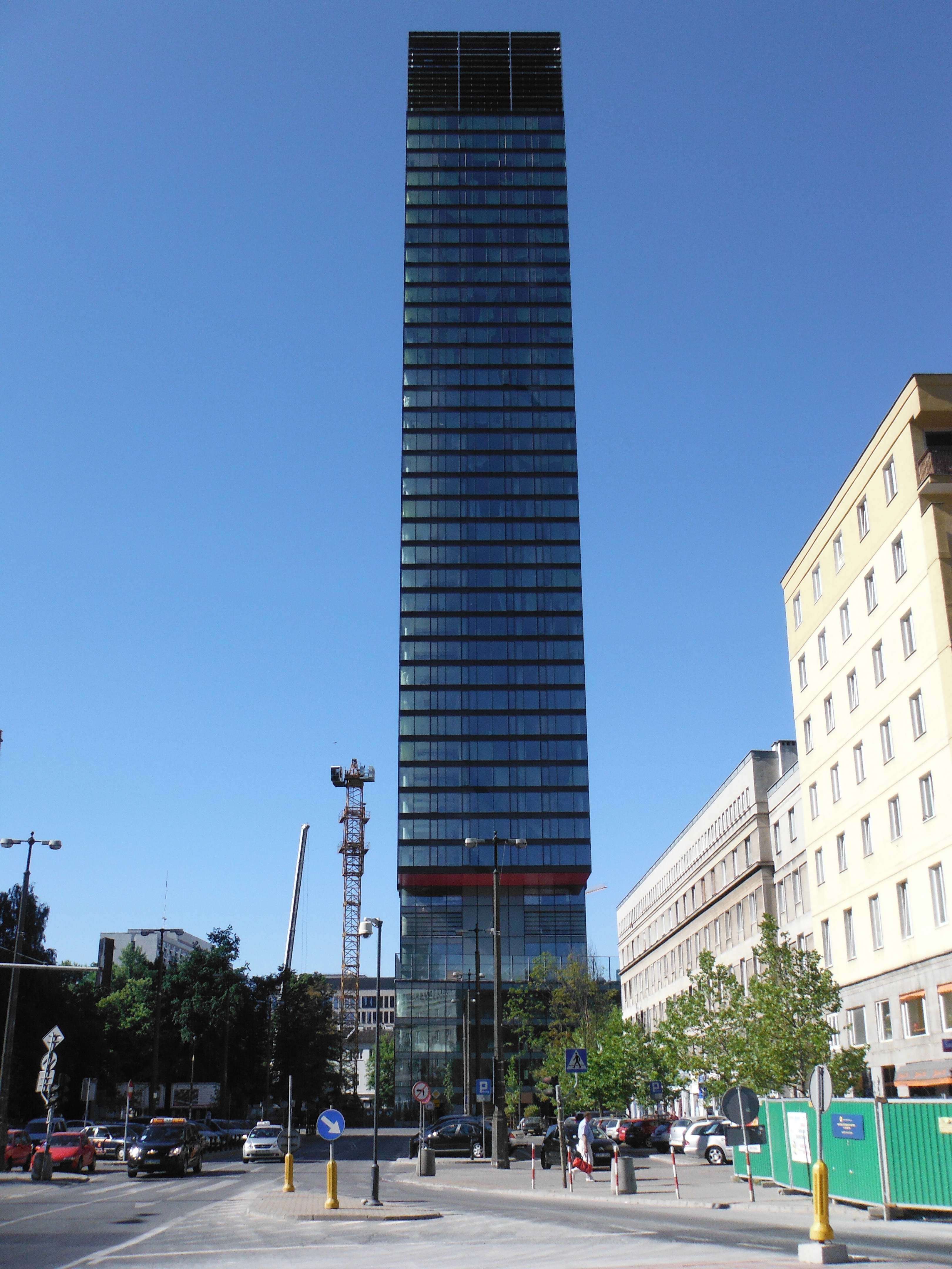 Wieżowiec Cosmopolitan w Warszawie (sierpień 2013).